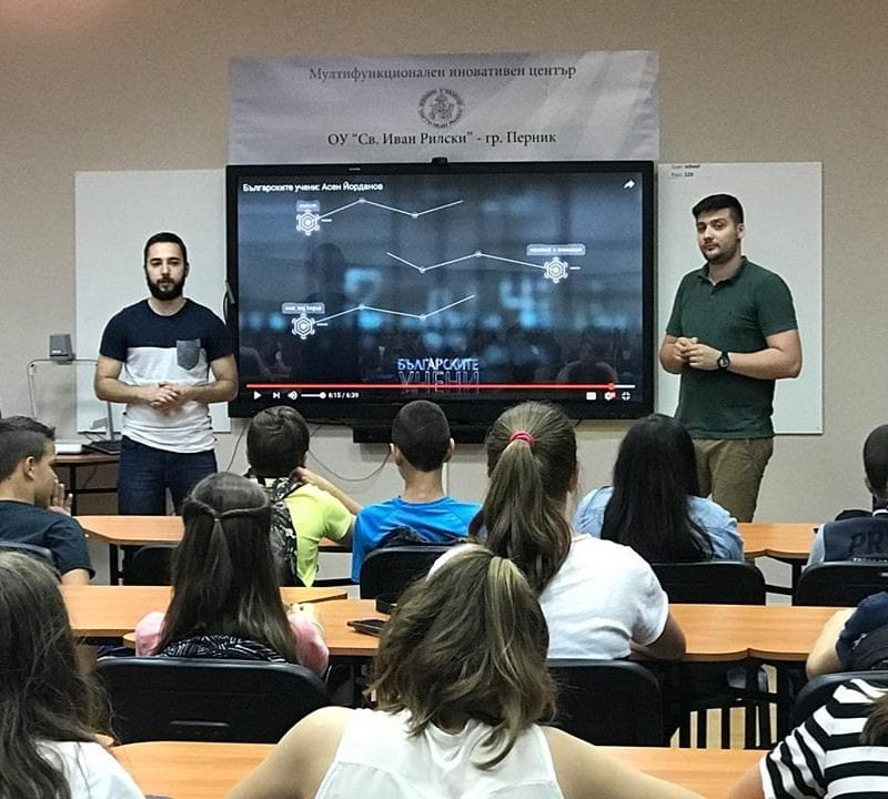 Екипът на „Българска история“ е посетил стотици български училища и се е срещнал с над 5000 ученици.